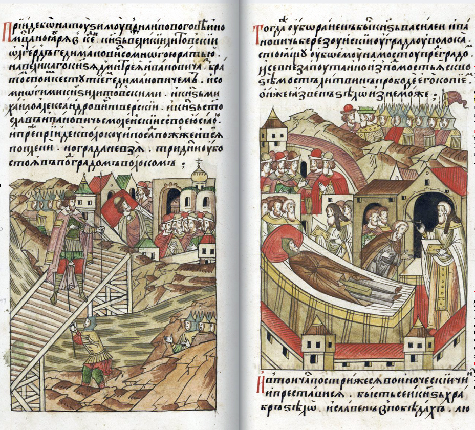 ЛИЦЕВОЙ ЛЕТОПИСНЫЙ СВОД Пришел в ту зиму, в Филиппов пост, месяца ноября в 25 день, великий князь Литовский Ольгерд Гедиминович с большим войском на великого князя Дмитрия Ивановича вместе со своим братом Кейстутом Гедиминовичем и с литовскими князьями, с князем Михаилом Александровичем Тверским и князем Святославом Ивановичем Смоленским с их войсками. Прежде всего войско подошло к Волоку, весь посад сожгли, захватили много пленных, но самого города не взяли, простояв три дня под городом Волоком. Тогда был ранен князь Василий Иванович Березуйский у города Волока: стоял он на мосту перед городом, и внезапно из-под моста литвин ударил его копьем. Тяжело раненный, он заболел, в тот же час постригся в иноческий чин и преставился. Был этот князь очень храбр и прославлен своими победами, любил [он священнический и иноческий чин, желал умереть постриженным в иноческий чин, и его желания не презрел Бог.]